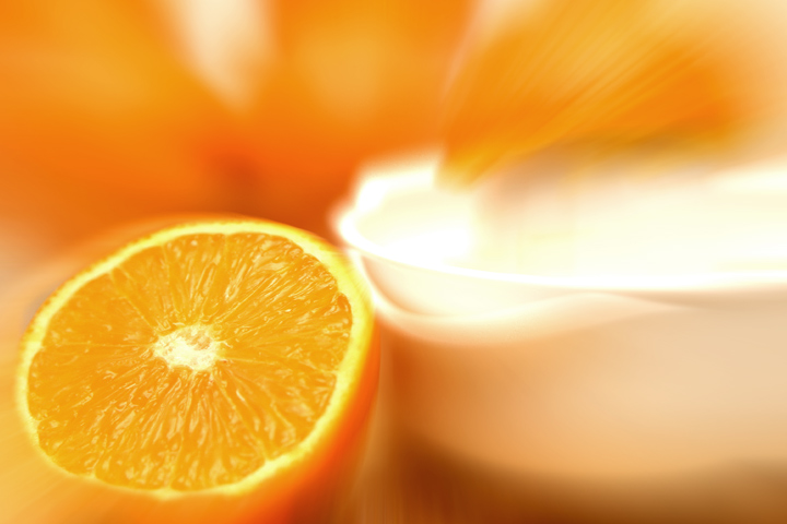 Klassischer Vitamin C-Spender: Die Orange (Citrus sinensis)